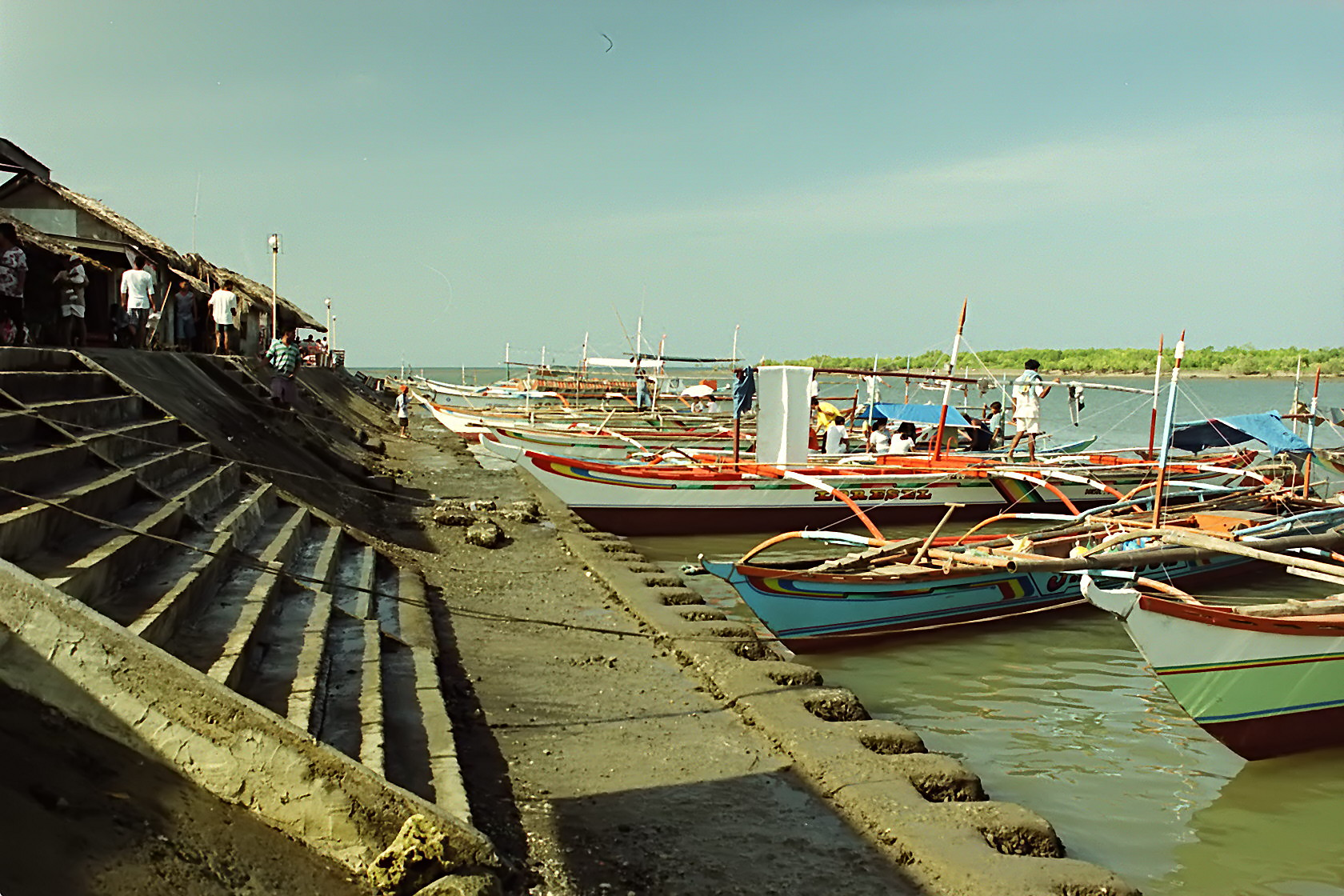 donsol -Philippines